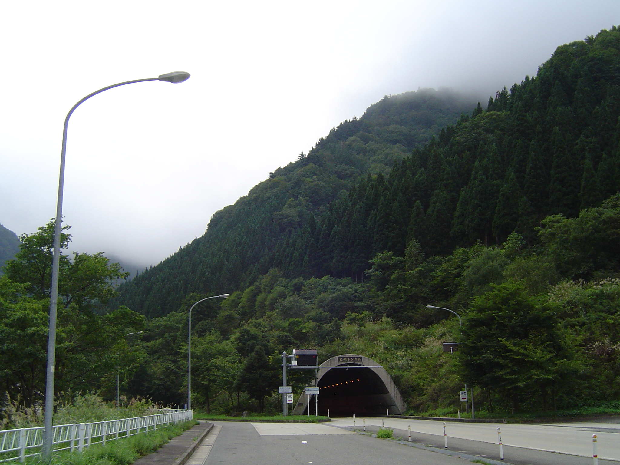 大峠トンネル（山形側）